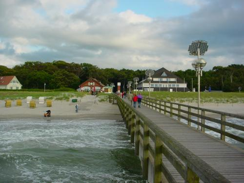 Graal-Müritz, Seebrücke